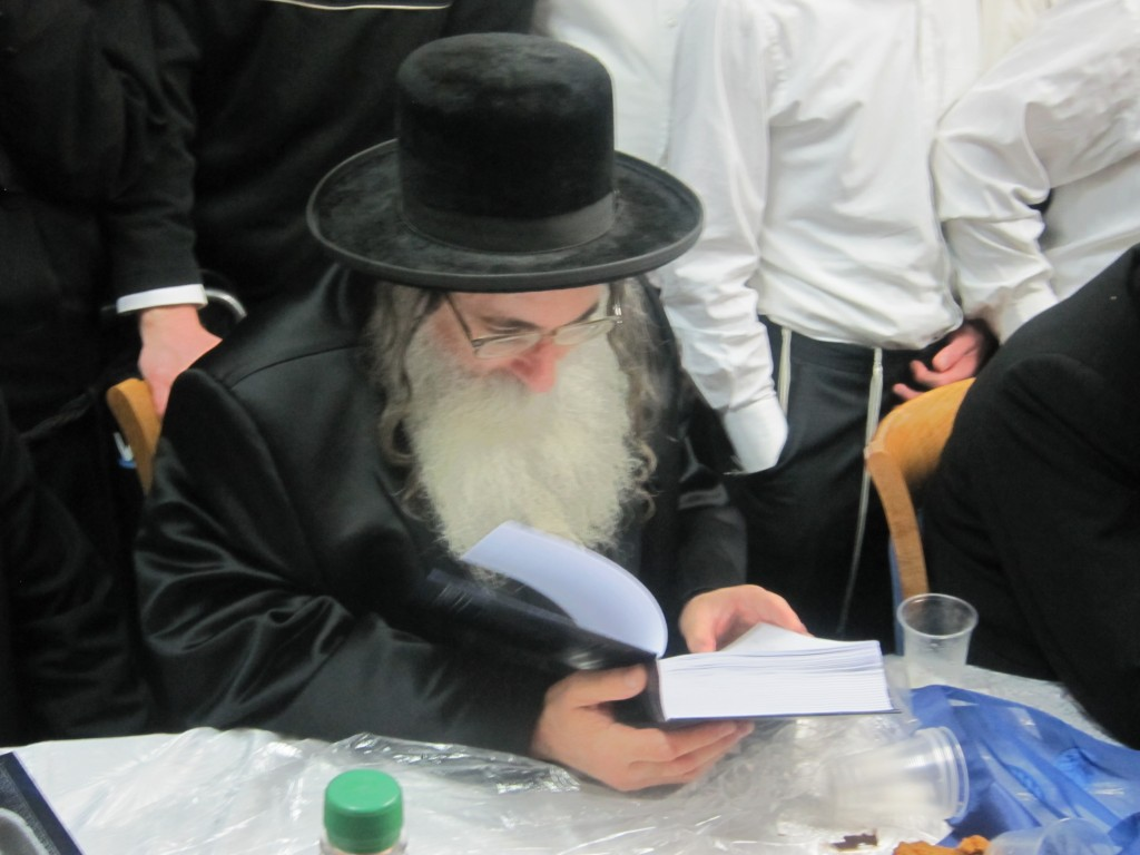 רבי שלמה לייב מירוסלב בטקס הו"ל ספר של הרב אריה פינקל בבית הרב